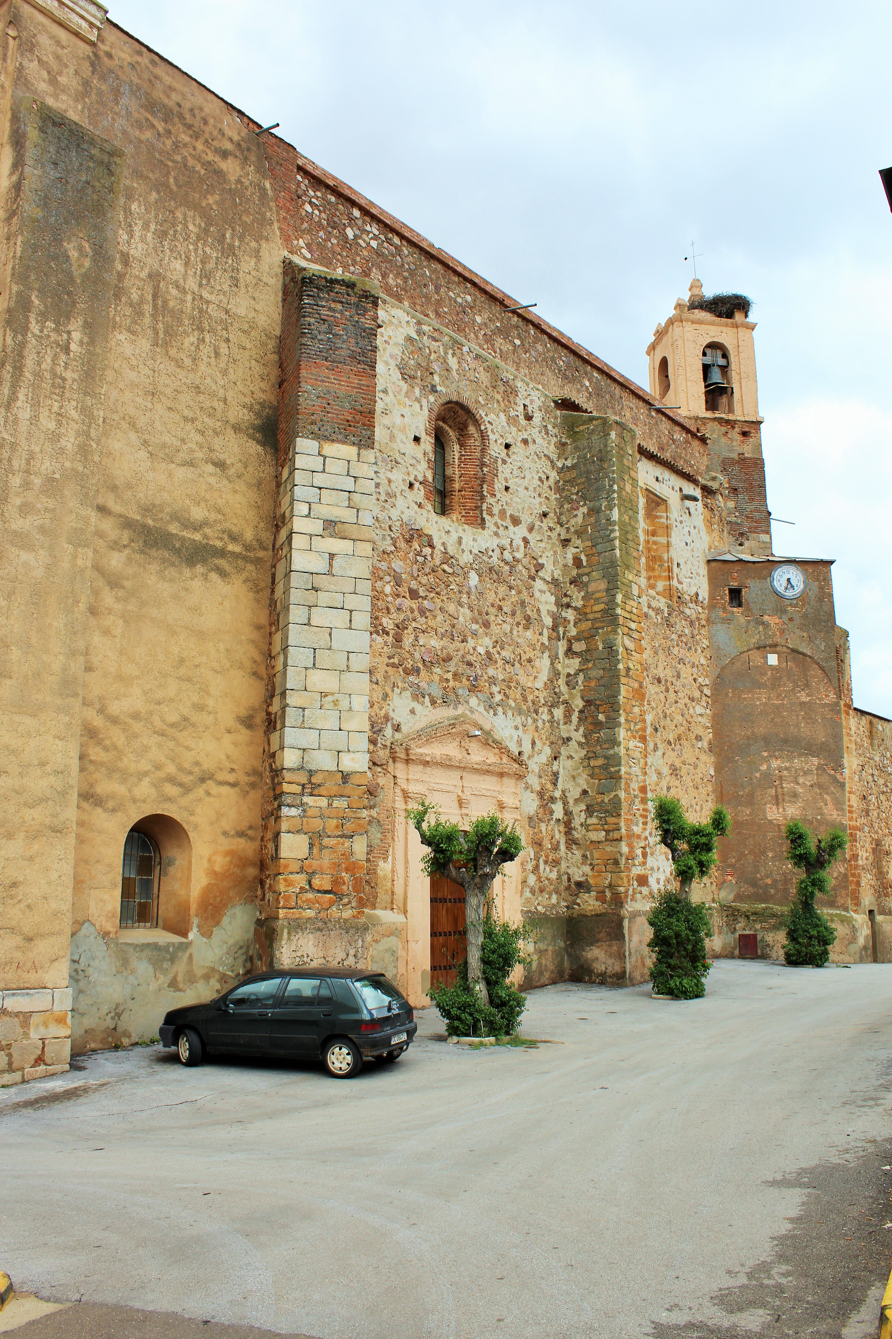 Oliva de Mérida. Fachada norte de iglesia parroquial